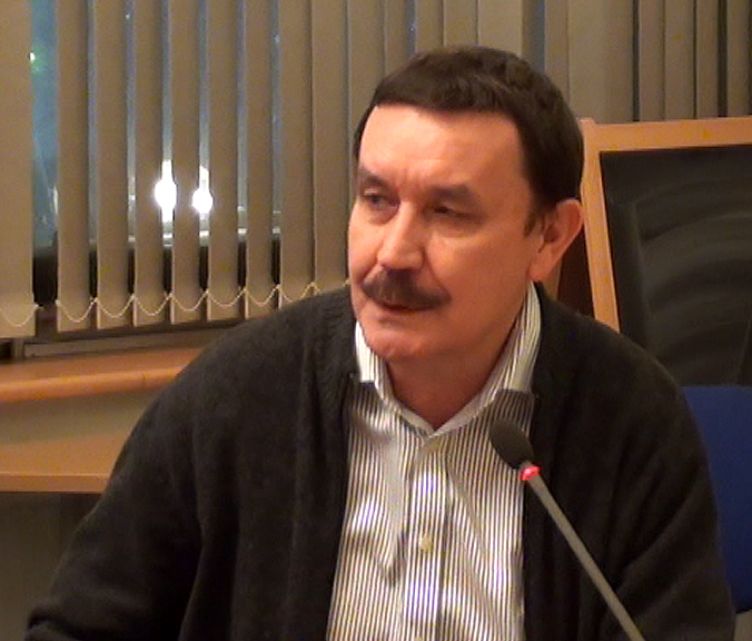 Вадим Юсупович Абдрашитов, советский и российский кинорежиссёр. Выступление в ЦДХ.